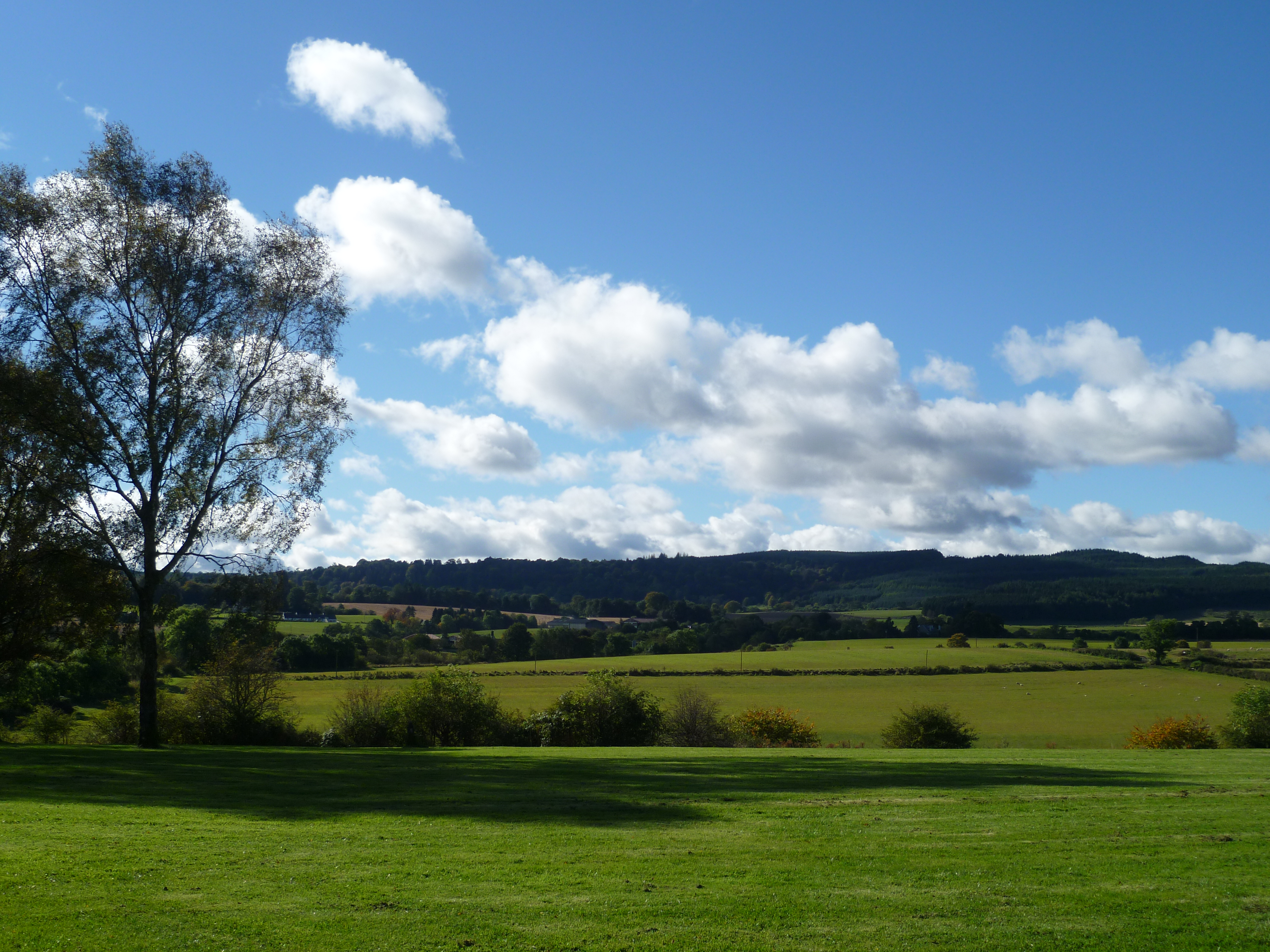 Battlefield Bannockburn, view to the lower area